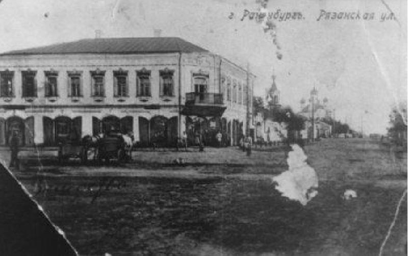 Чаплыгин. Рязанская улица.